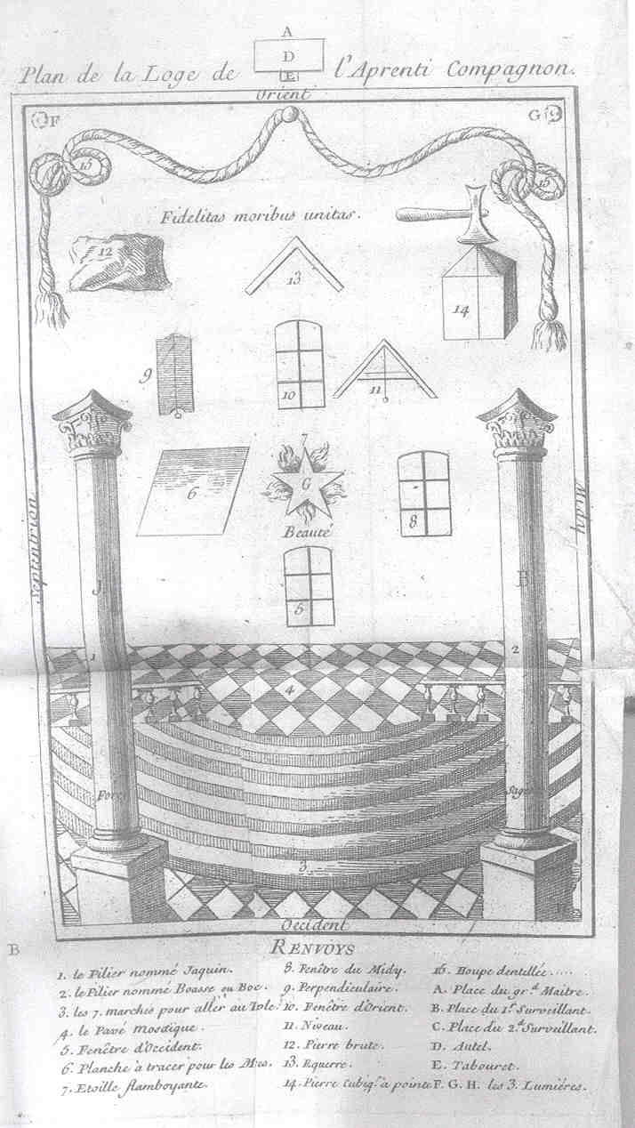 Gravure intitulée: Plan de la Loge de l'Aprenti Compagnon, ornant le livre LE SCEAU ROMPU etc..., à Cosmopolis 1745.